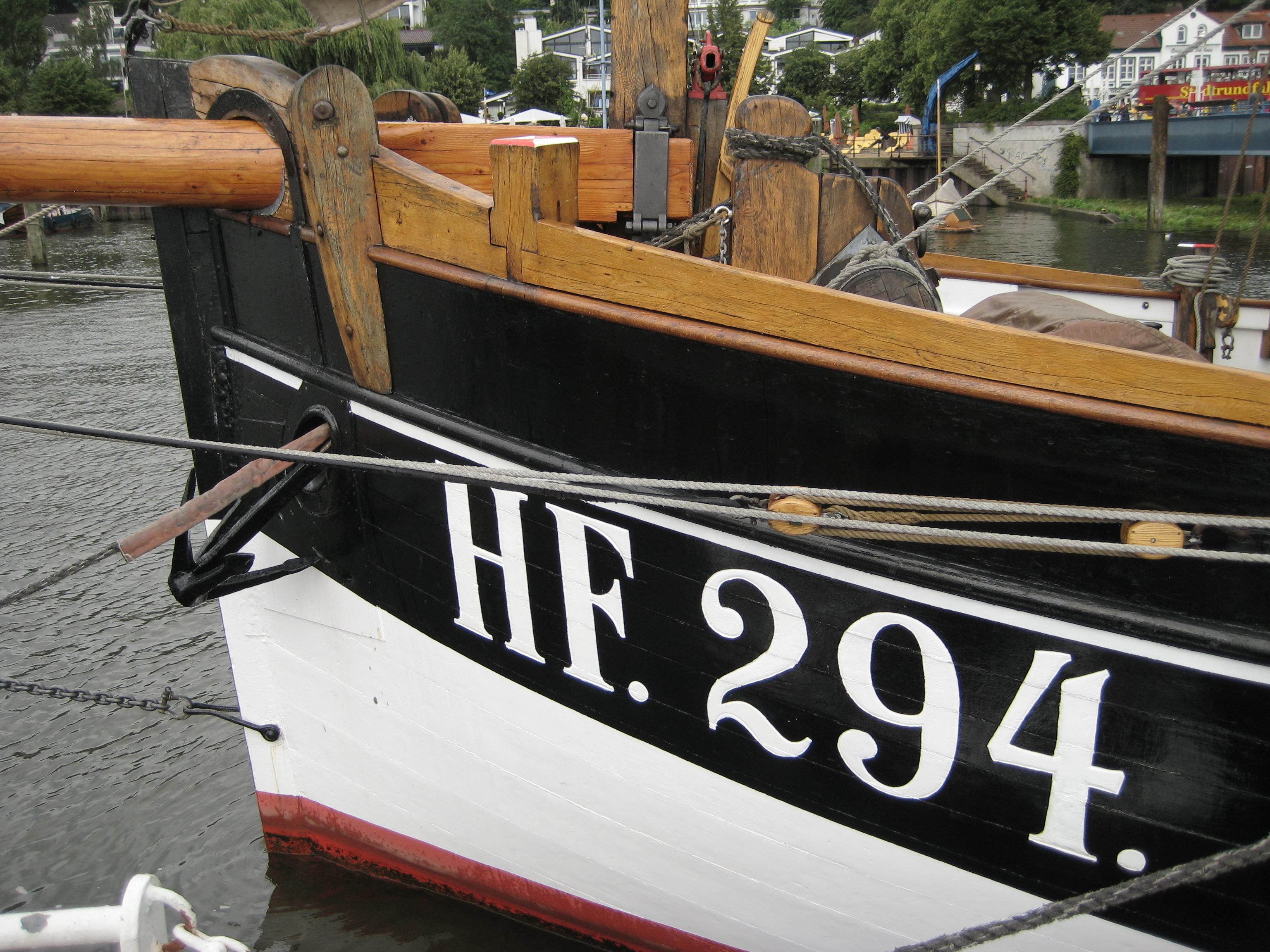 Praesident Freiherr von Maltzahn, Museumsschiff in Oevelgoenne